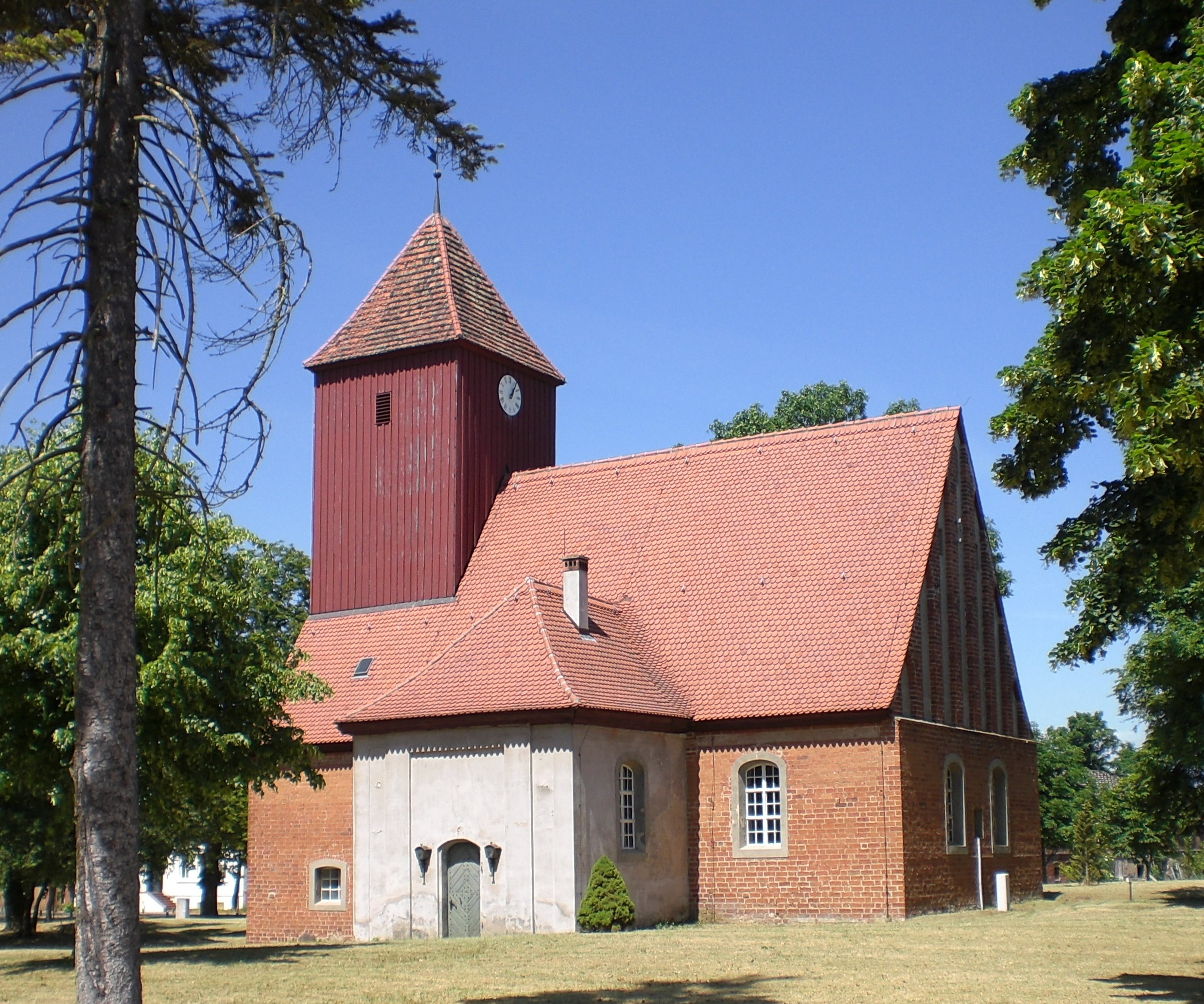 Dorfkirche Börnicke, Südseite